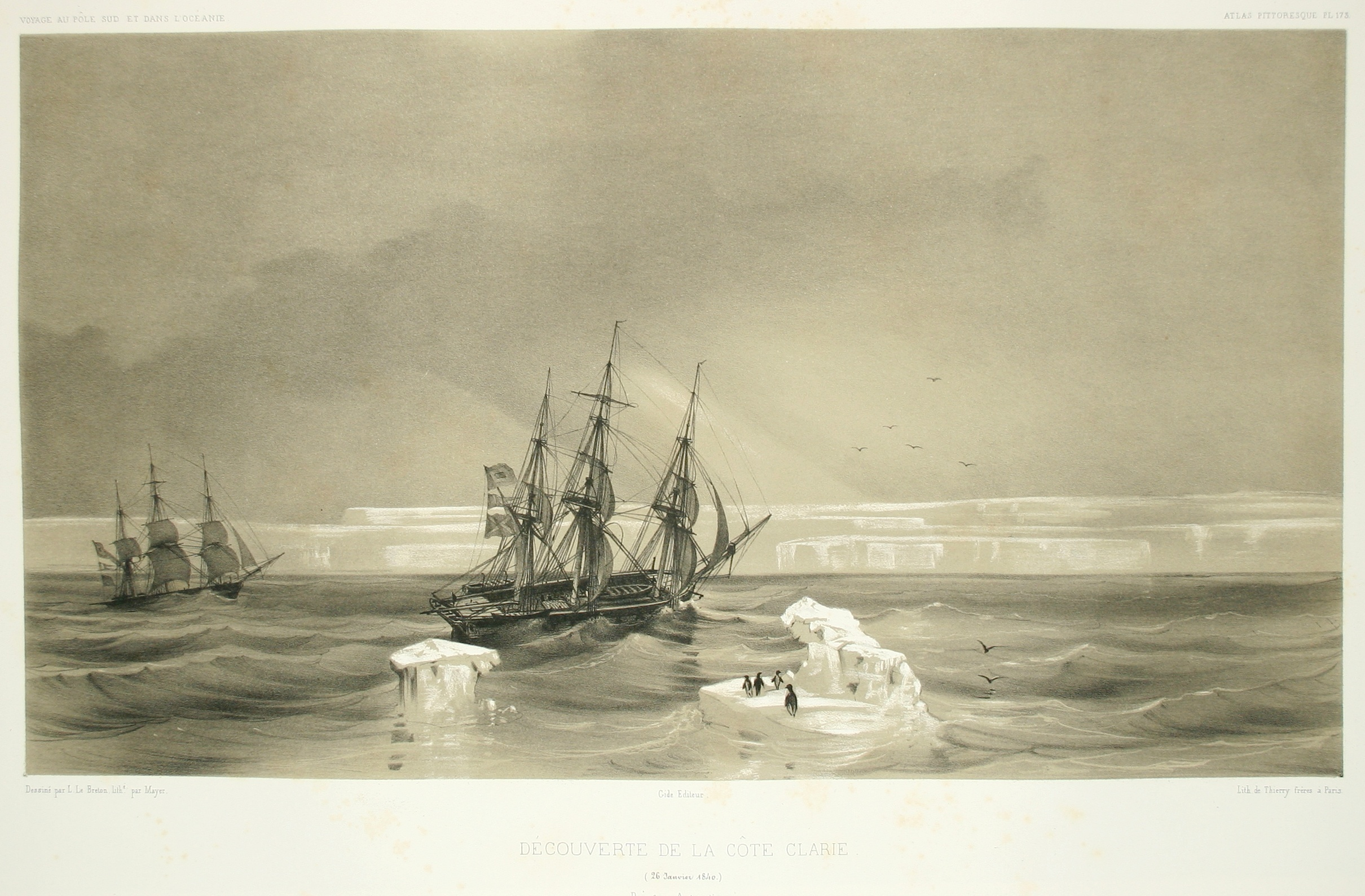 Découverte de la côte Clarie, le 26 janvier 1840. Atlas pittoresque, planche 173